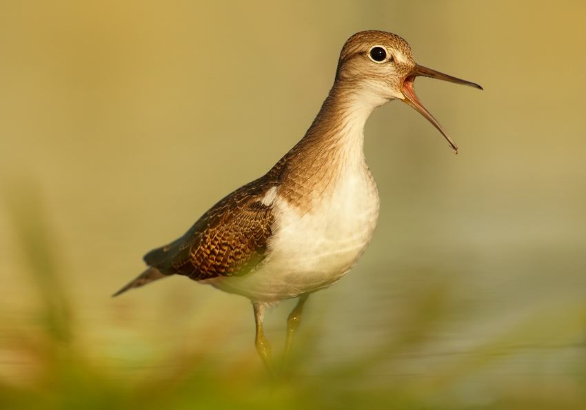 Actitis hypoleucos, střední Morava, CZ